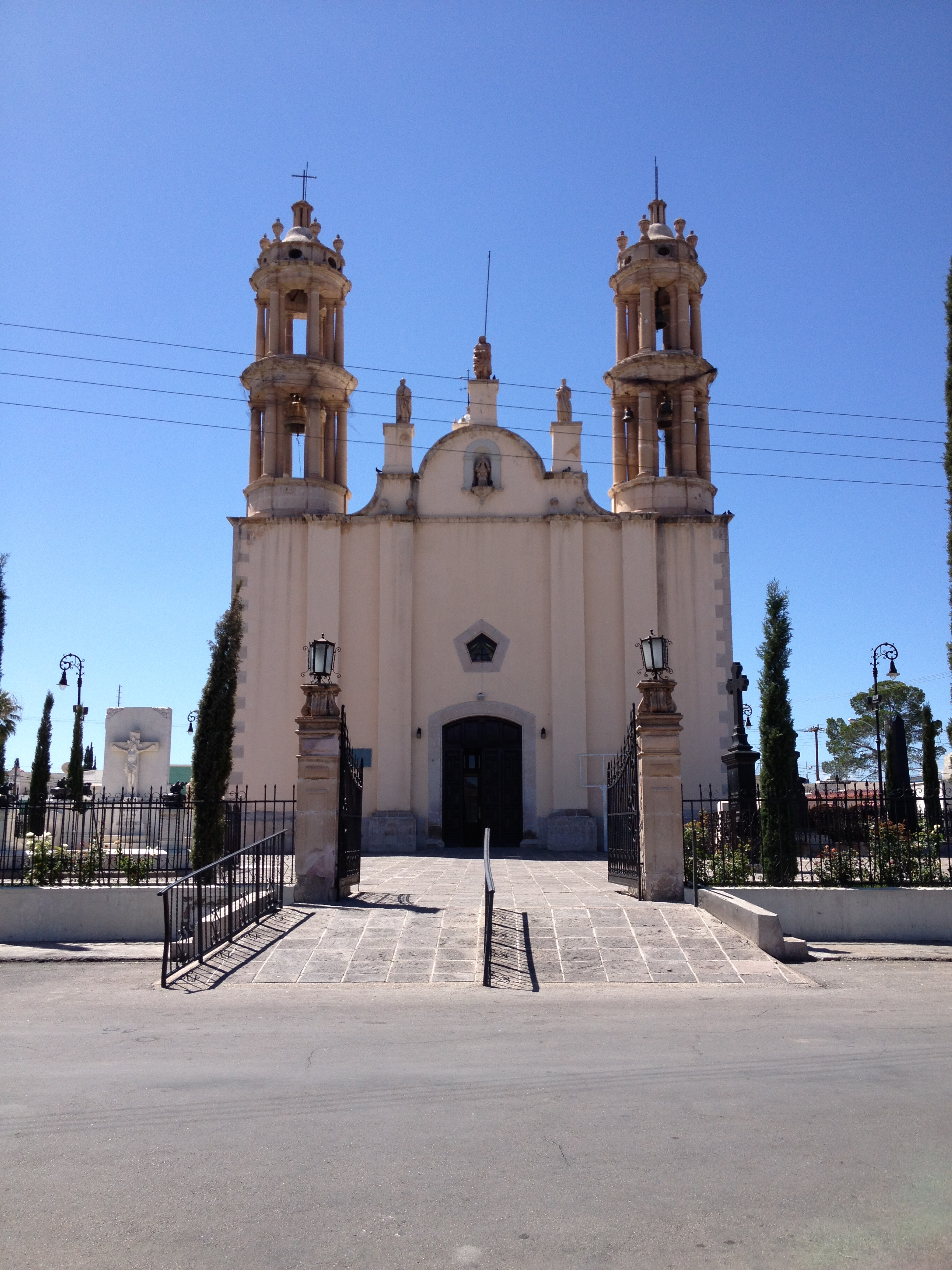 Fachada del Santuario de Guadalupe, Chihuahua